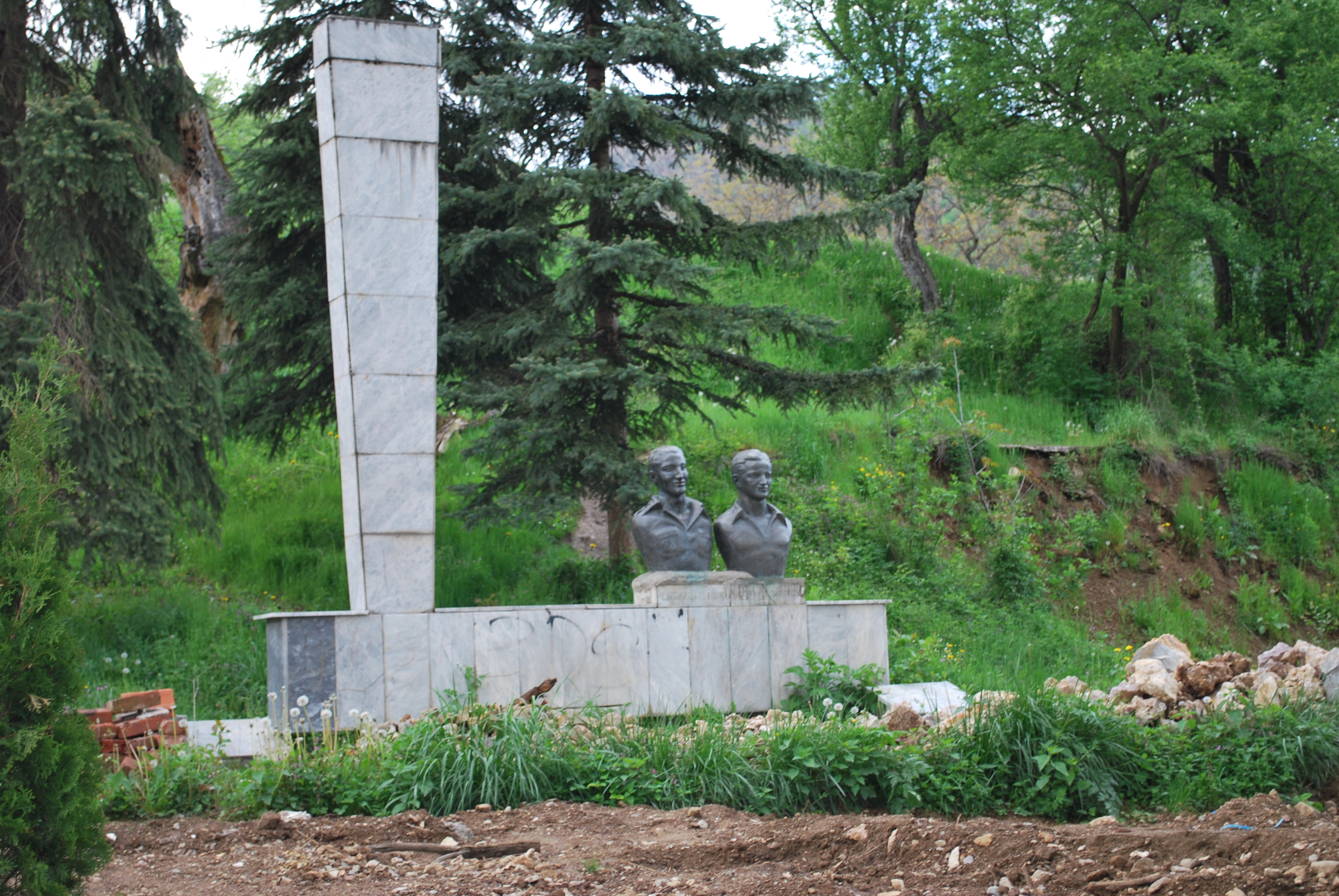 Паметник във Вруток, Гостиварско. Дело на Глигор Чемерски.